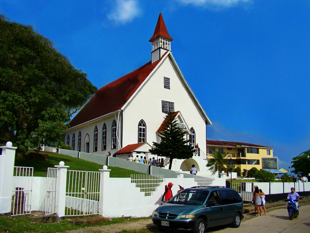 La iglesia de San Luis en las islas de San Andrés Colombia